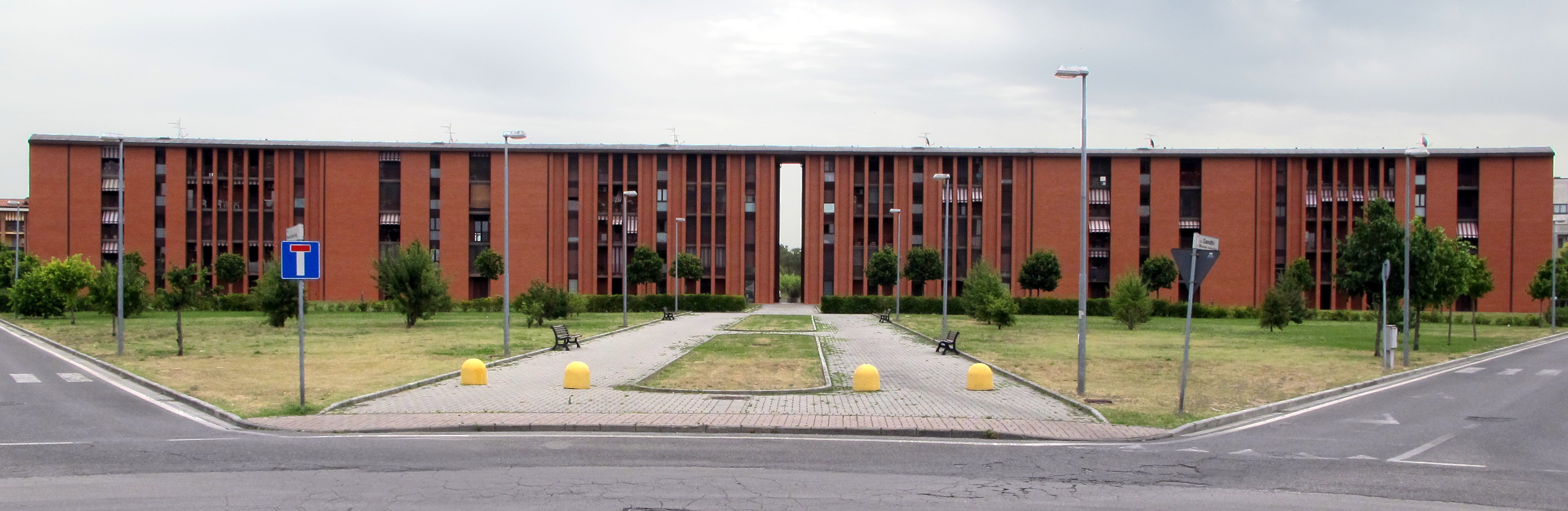 Pontedera